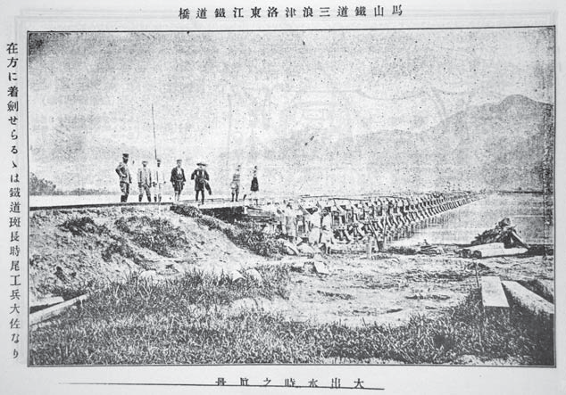 馬山鐵道三浪津洛東江鐵道橋 大出水時之眞景 在方に着劍せらるゝは鐵道班長時尾工兵大佐なり 『朝鮮之實業』第6号（明治38年10月）